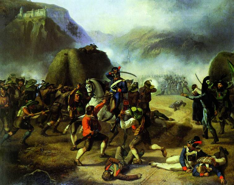 bataille de Sterzing entre les insurgés tyroliens et les Bavarois en 1809